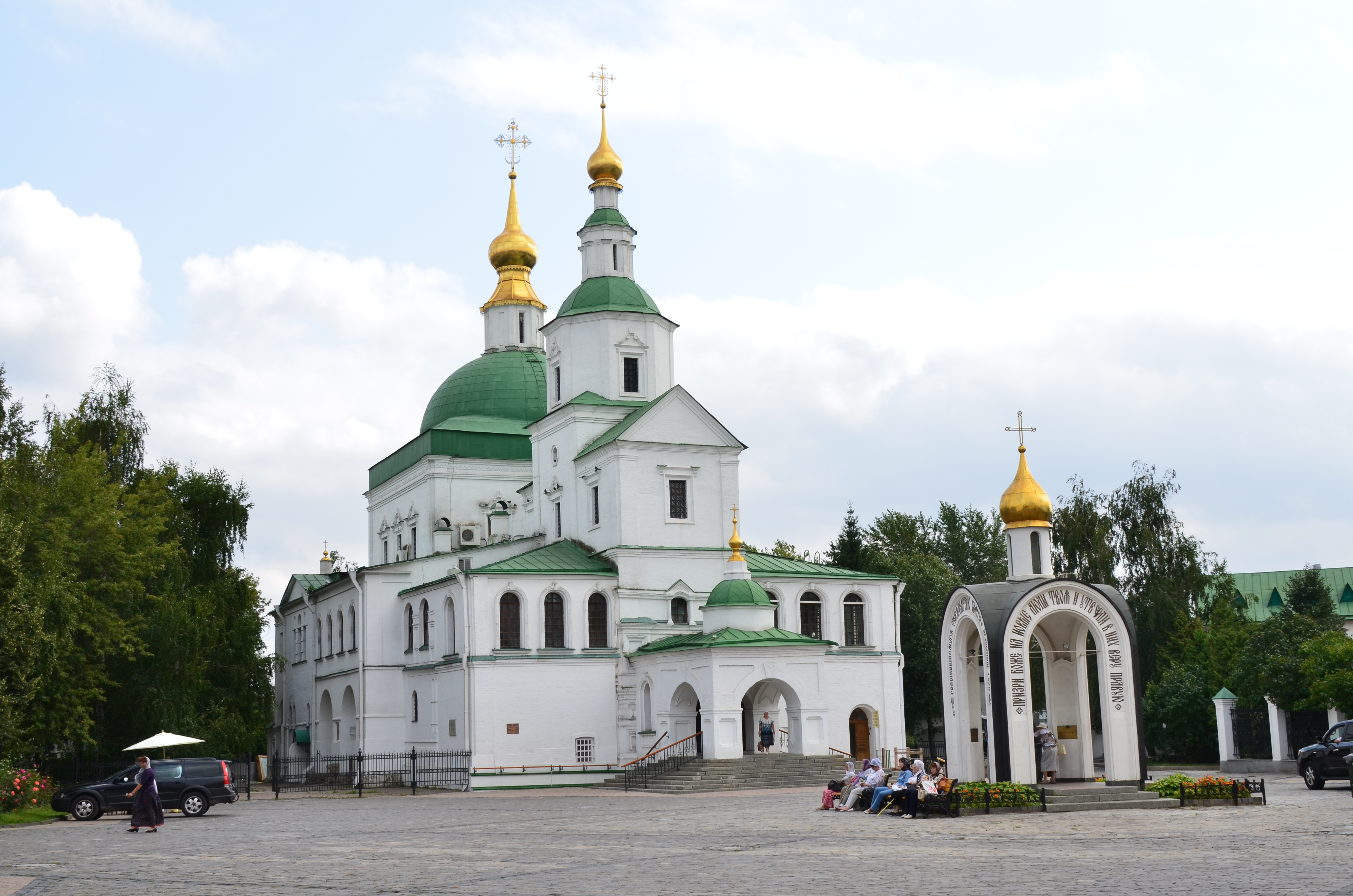 Монастырь Даниловский (Москва и Московская область, Москва, Даниловский Вал улица, 22)